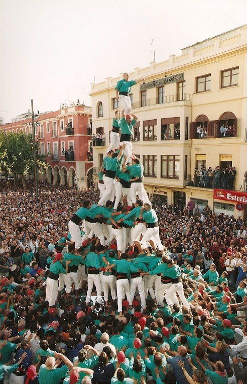 Pilar de 9 amb folre, manilles i puntals. Única vegada que s'ha portat a plaça. No es considera intent vàlid. 1-11-2002 a Vilafranca del Penedès per diada Tots Sants.